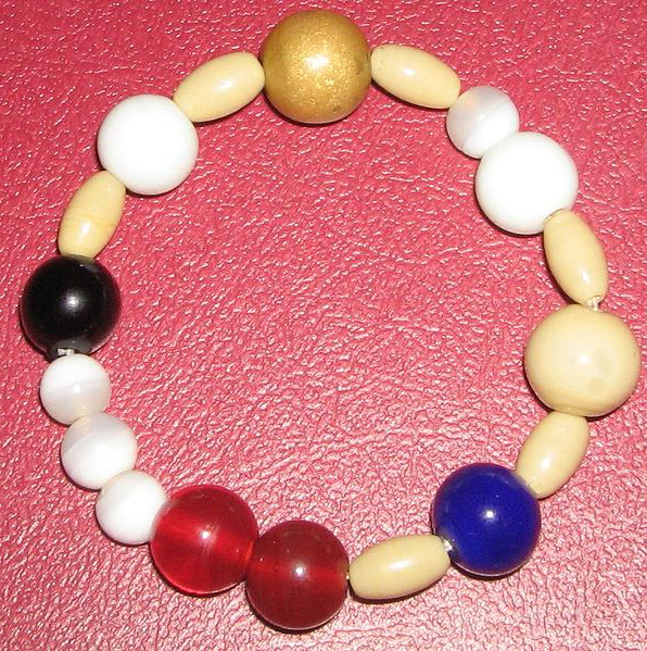 Жемчужины жизни.